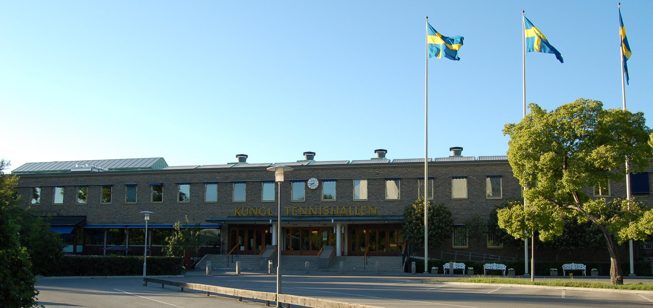 Kungliga Tennishallen, Stockholm